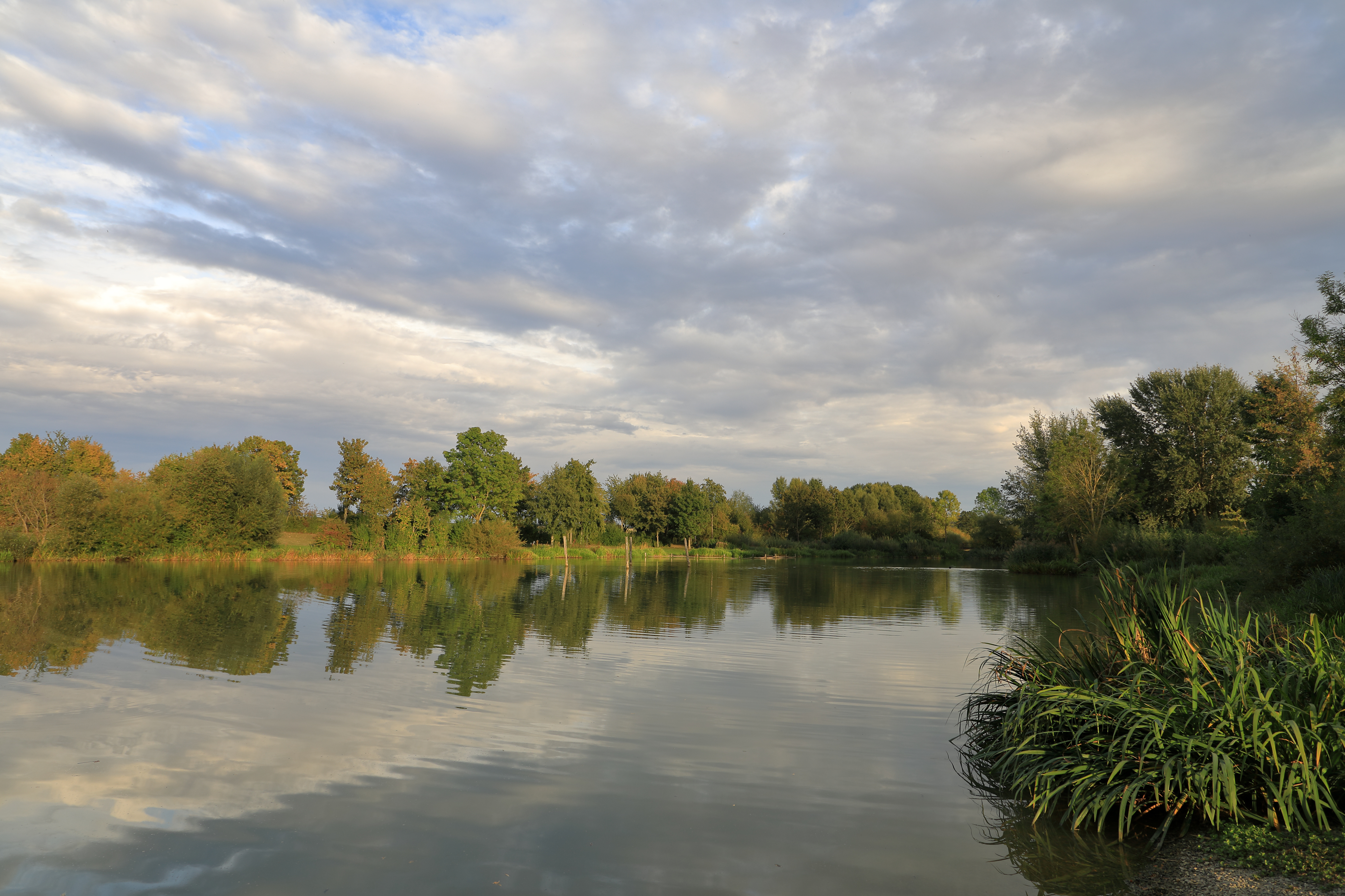 Der Rinderfelder See beim Niederstettener Ortsteil Rinderfeld wurde als Regenrückhaltebecken gebaut. Er ist heute ein frei zugänglicher Badesee.